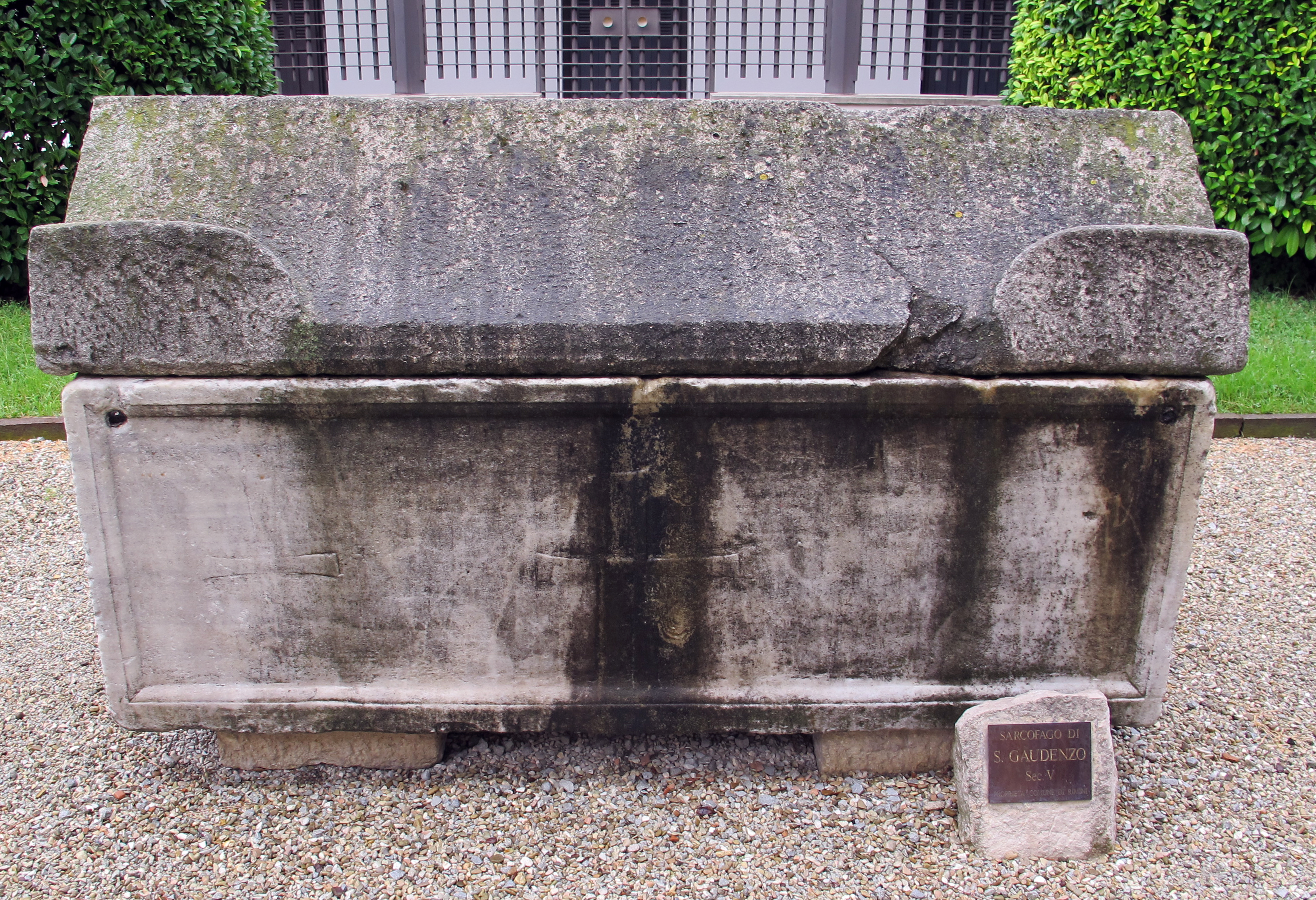 Tempio Malatestiano - MIBAC This is a photo of a monument which is part of cultural heritage of Italy.